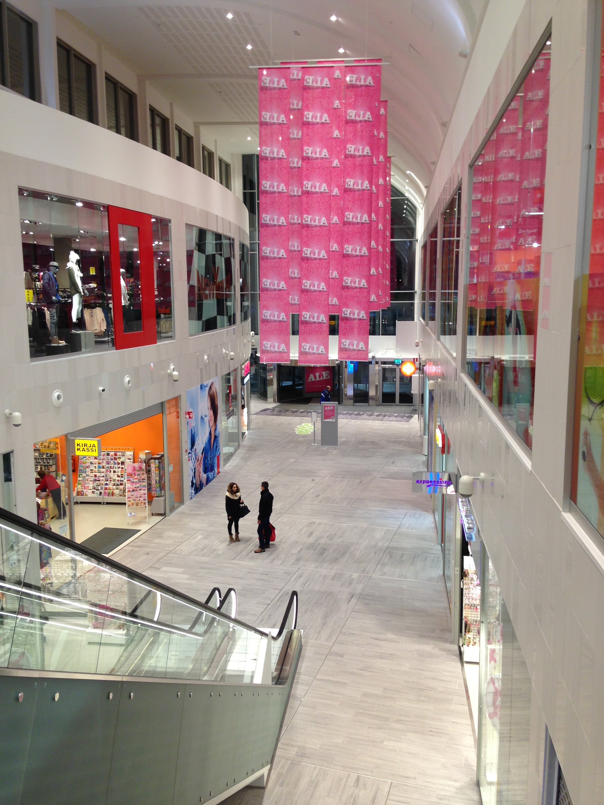 Matkuksen kauppakeskuksen eteläinen pääty